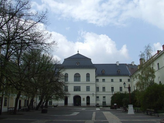 1631 gegründet von Susanna Lorántffy (Innenansicht)